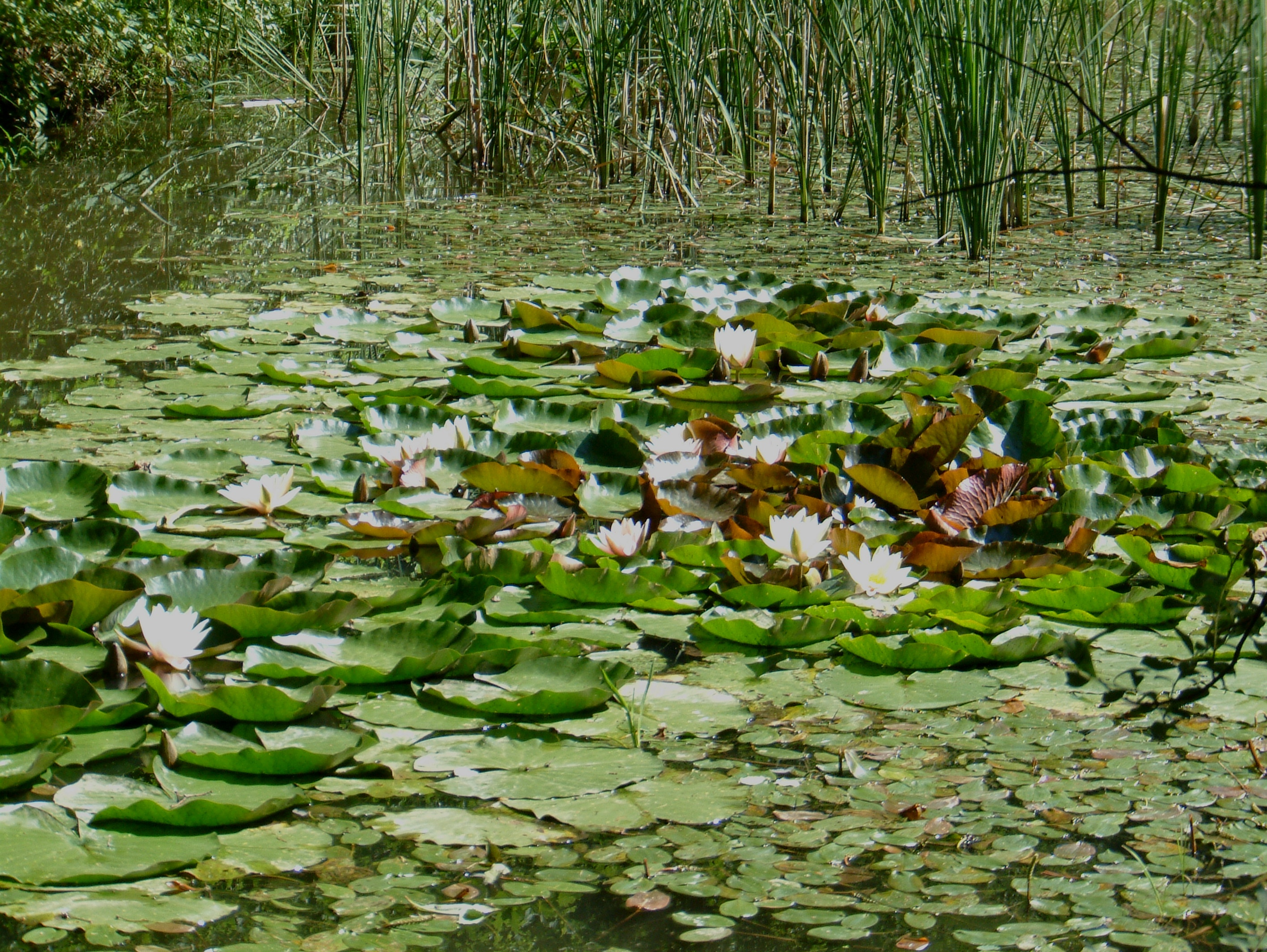 Weiße Seerose (Nymphaea alba): Augustusburg Sachsen am Schwarzen Teich 6. August 2007